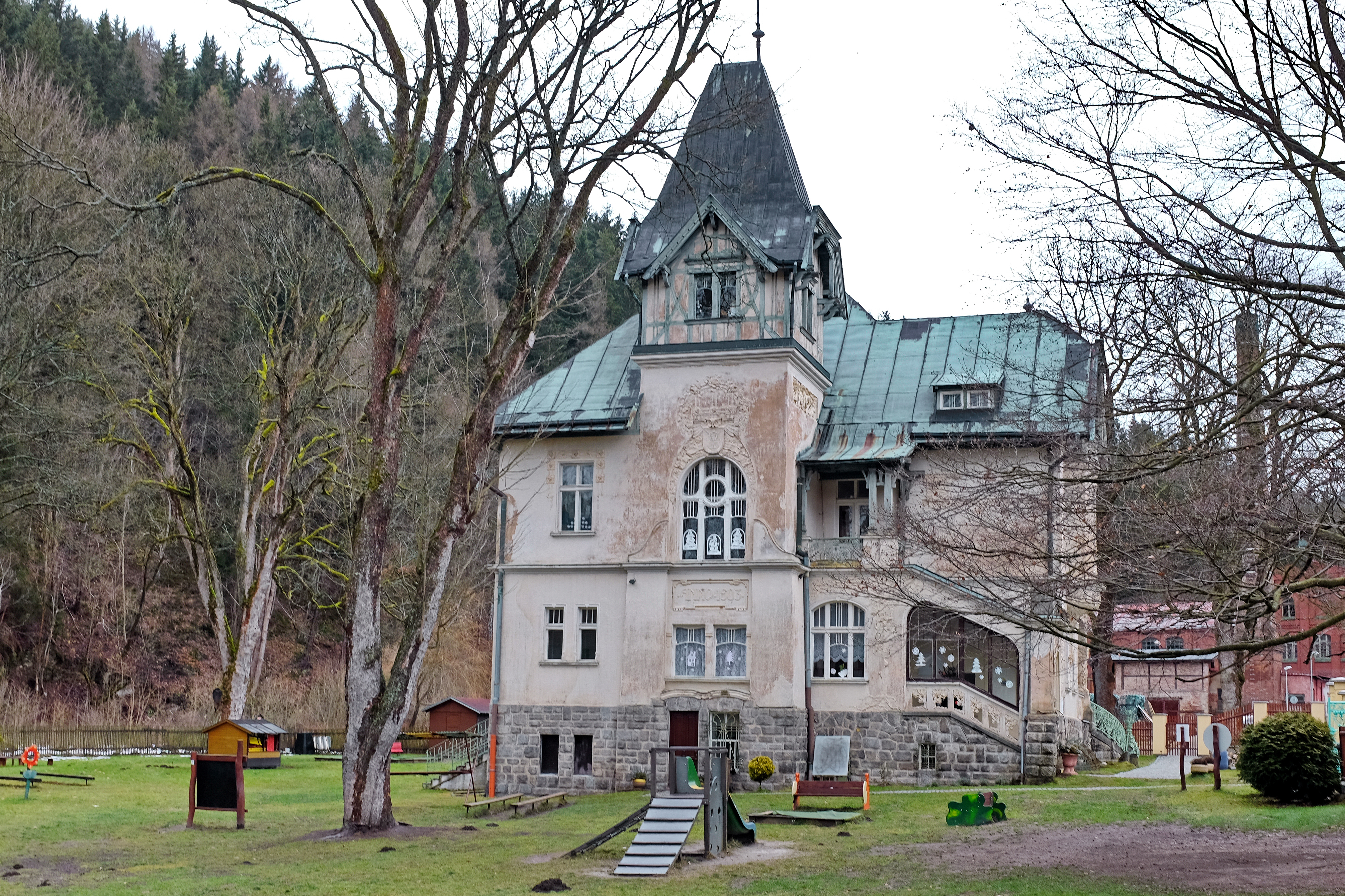 Vila Lipová cesta 17, Lipová cesta 1091/17, Kraslice (okres Sokolov).